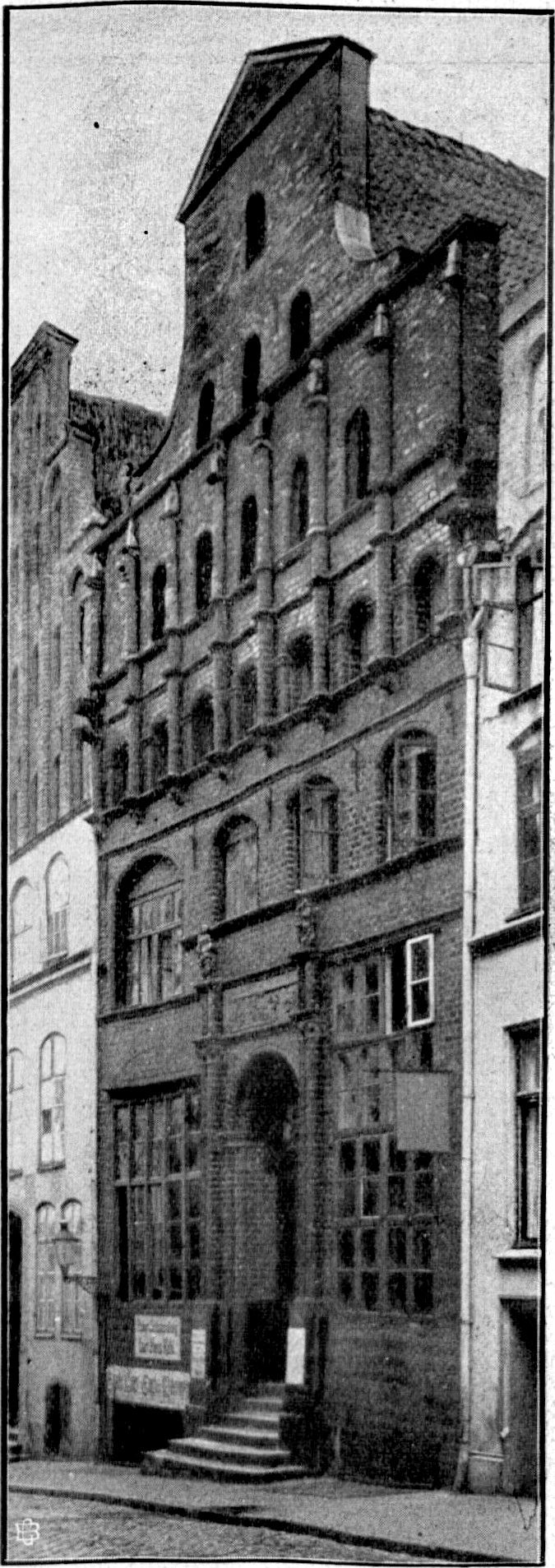 Der Giebel des Hauses Fischstraße 34